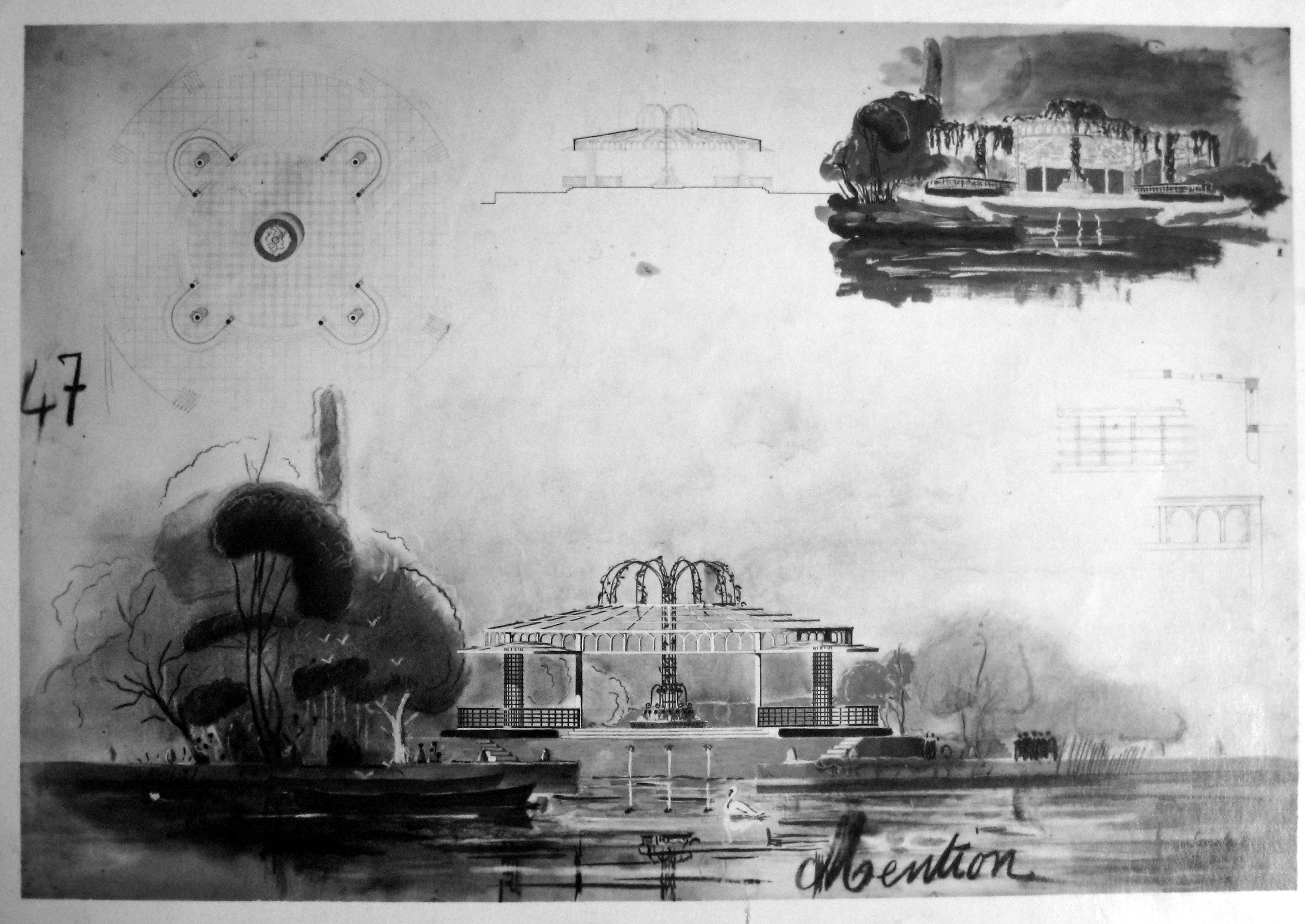 Projet primé en 1ère mention au concours Delaon 1938 - Fontaines - Architecte Toma Barbu Socolescu (1909-1977)